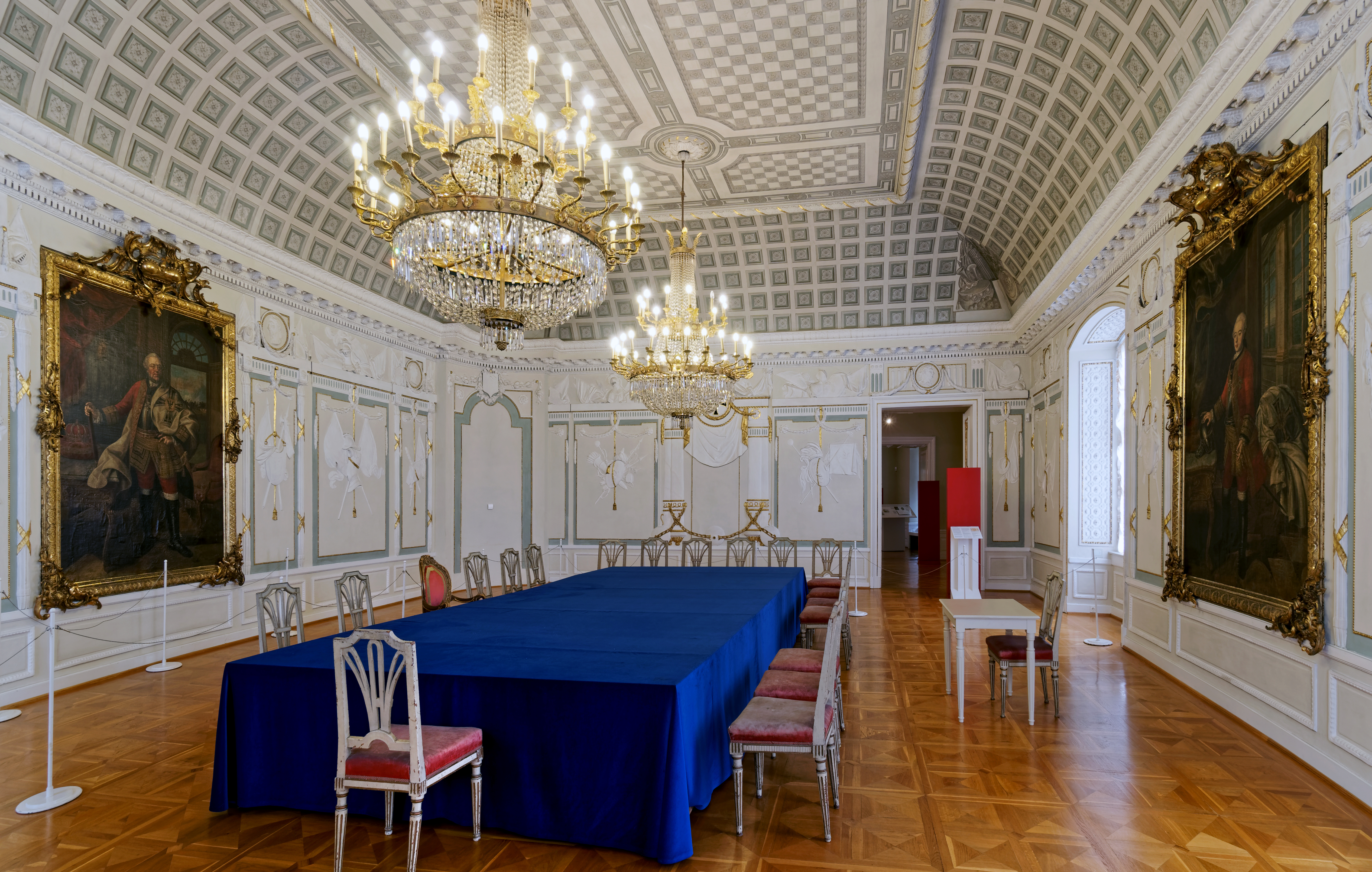 Kapitelsaal (1780/82) im Deutschordensschloss Bad Mergentheim.